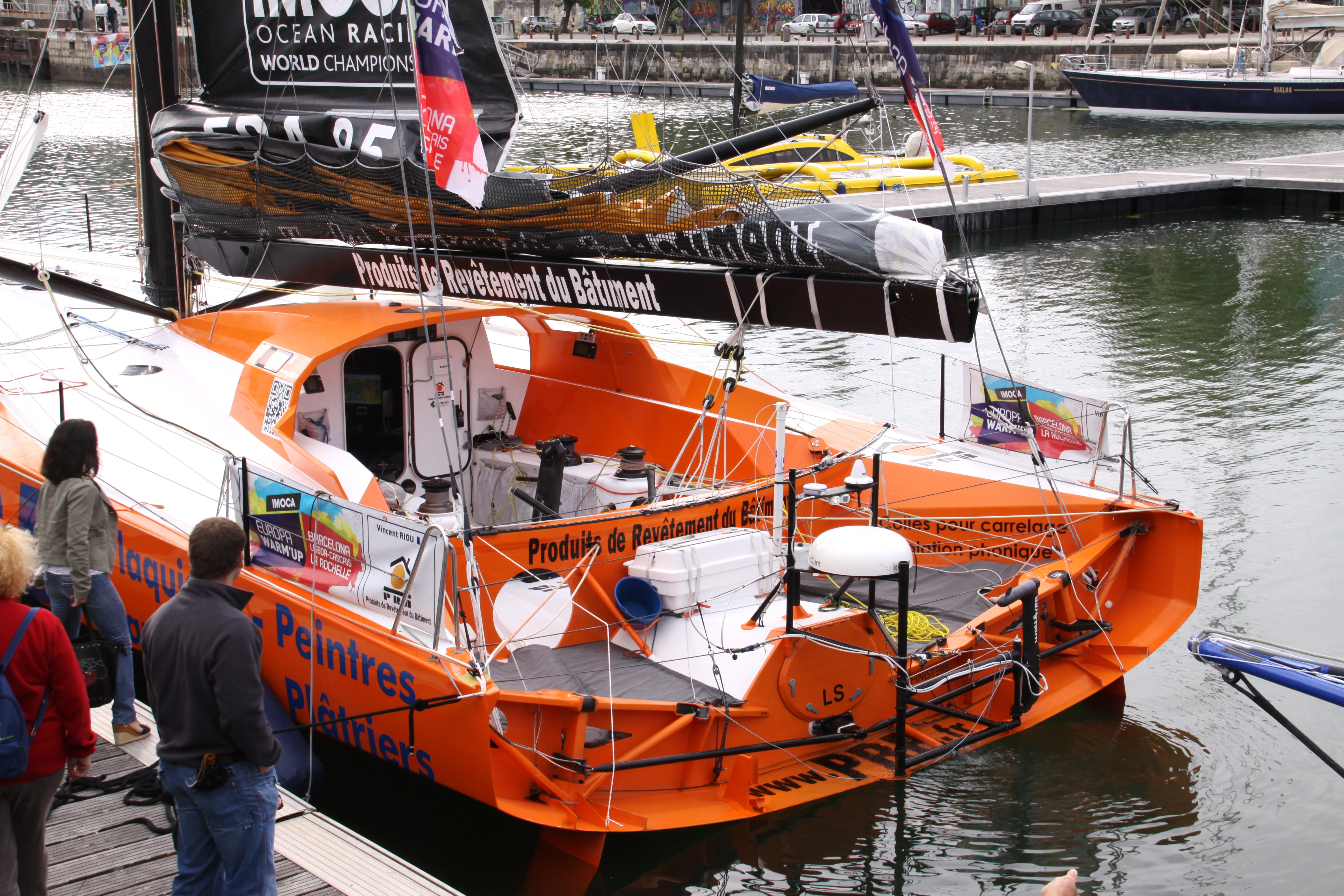 Le voilier de course Open 60 de classe IMOCA « PRB » dans le Bassin des Chalutiers à La Rochelle, lors de l’ Europa Warm’ Up Race en 2012. La Rochelle fut la ville arrivée de cette course. Le « PRB » a été lancé en 2010. Ce bateau fut le vainqueur de l’ Europa Warm’ Up Race et abandonna dans la course à la voile autour du monde Vendée Globe 2012-2013. Skipper: Vincent Riou. La Rochelle, Charente Maritime, France